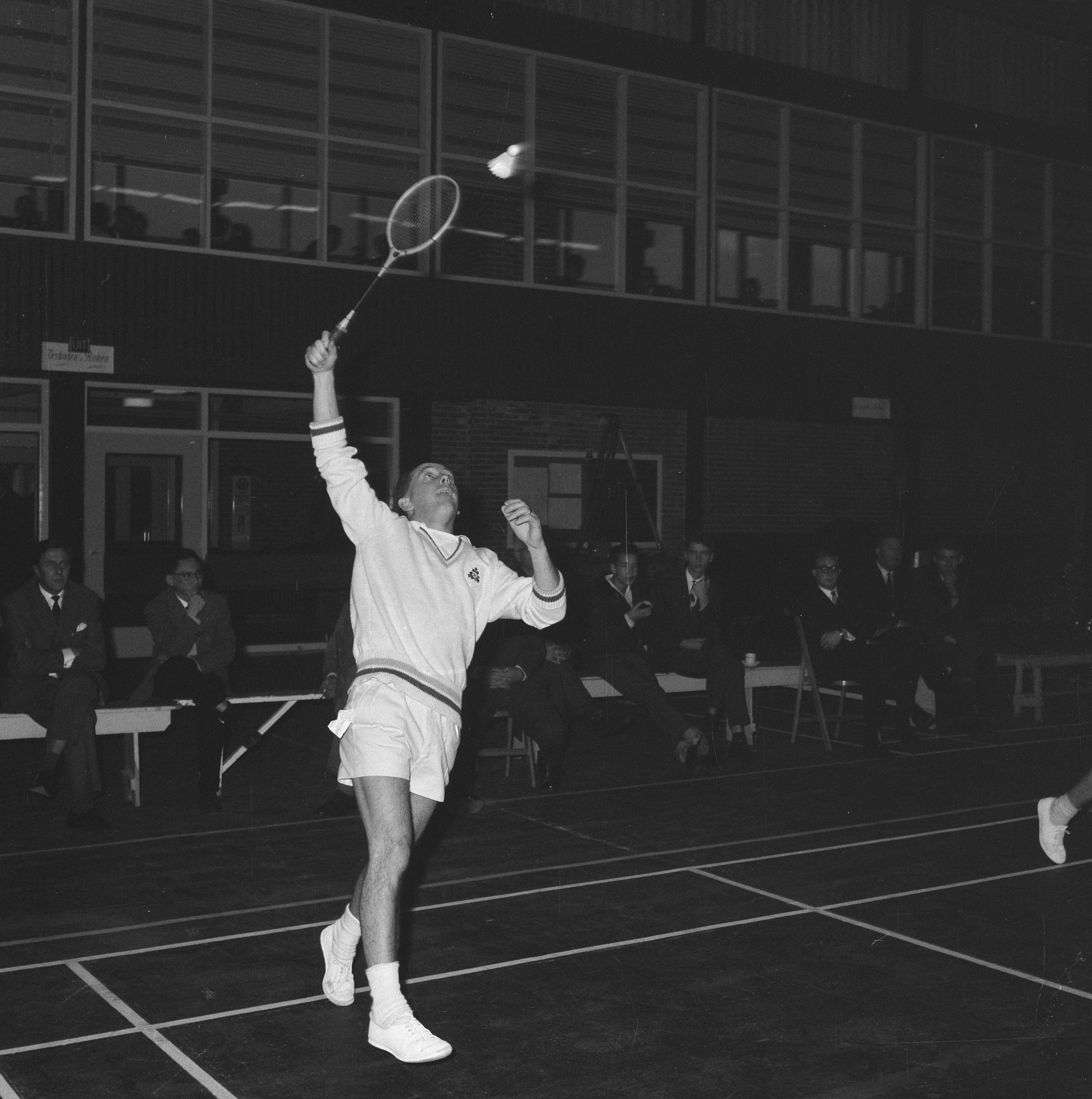 Collectie / Archief : Fotocollectie Anefo Reportage / Serie : [ onbekend ] Beschrijving : Badminton Nederland tegen Ierland te Haarlem. J. P. Doyler (Ierland) in aktie Datum : 16 november 1963 Locatie : Haarlem Trefwoorden : AKTIES, BADMINTON Fotograaf : Nijs, Jac. de / Anefo Auteursrechthebbende : Nationaal Archief Materiaalsoort : Negatief (zwart/wit) Nummer archiefinventaris : bekijk toegang 2.24.01.03 Bestanddeelnummer : 915-7447